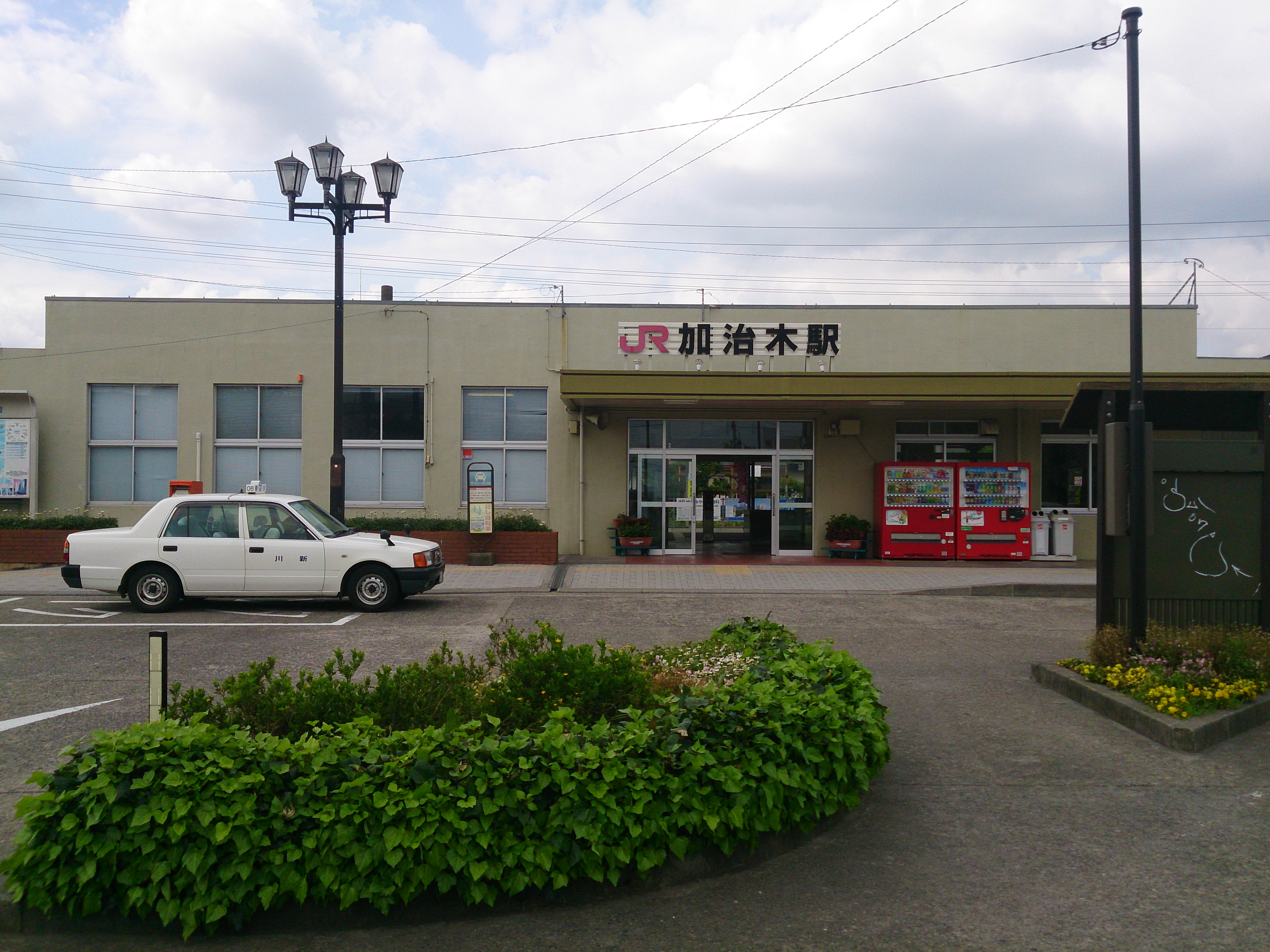 加治木駅 駅舎